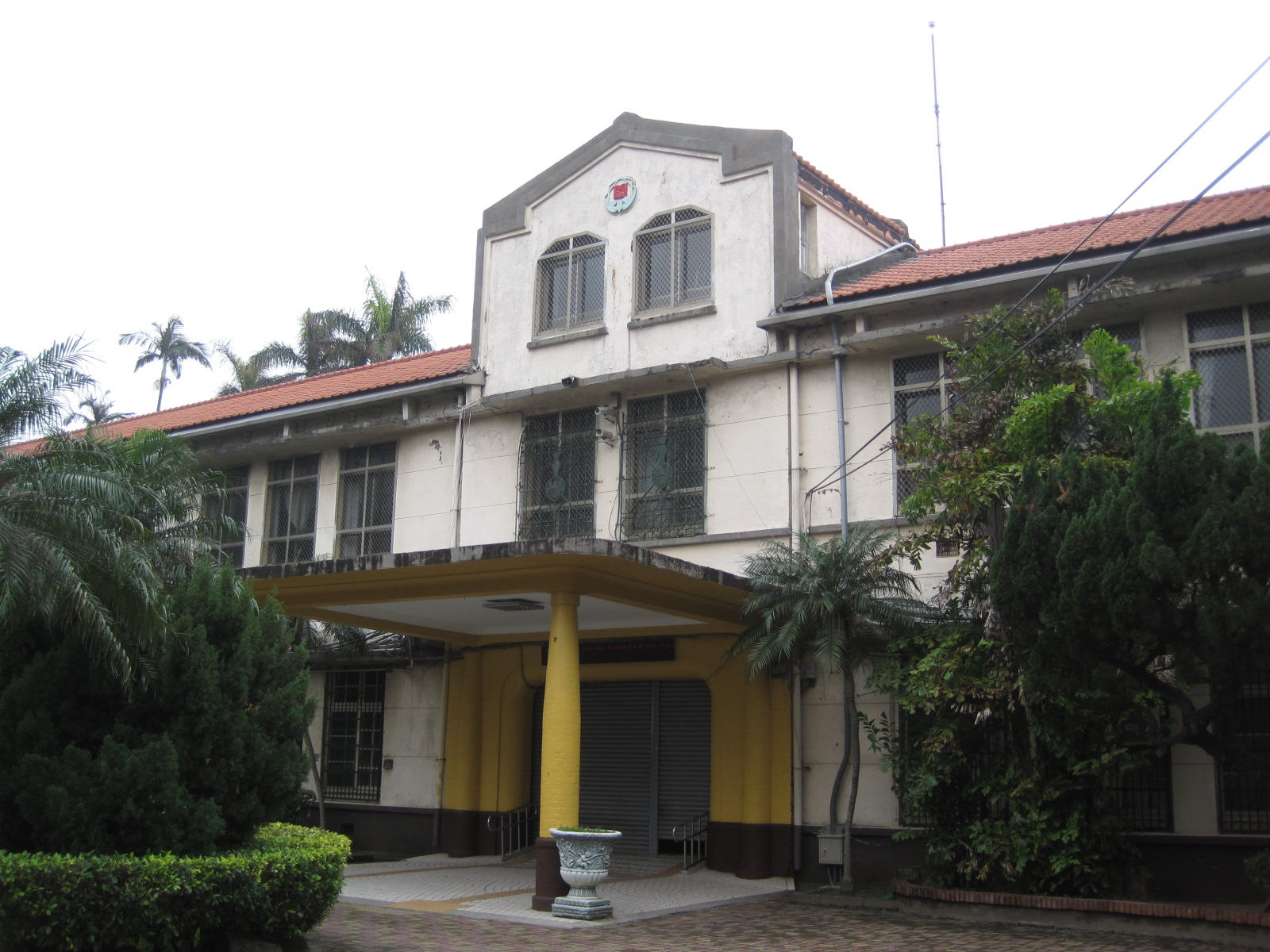 新竹國小百齡樓